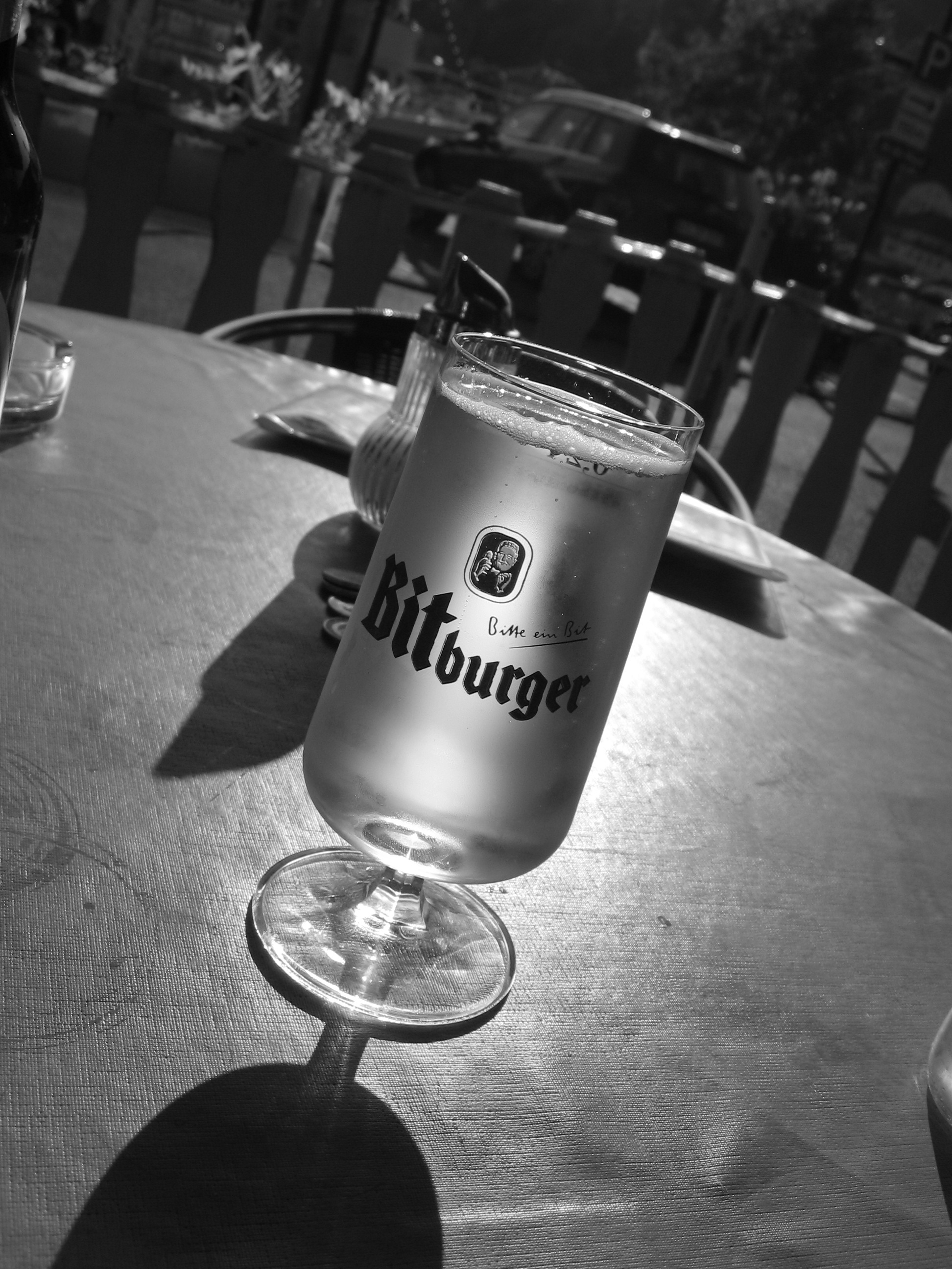 Zwart-Wit foto